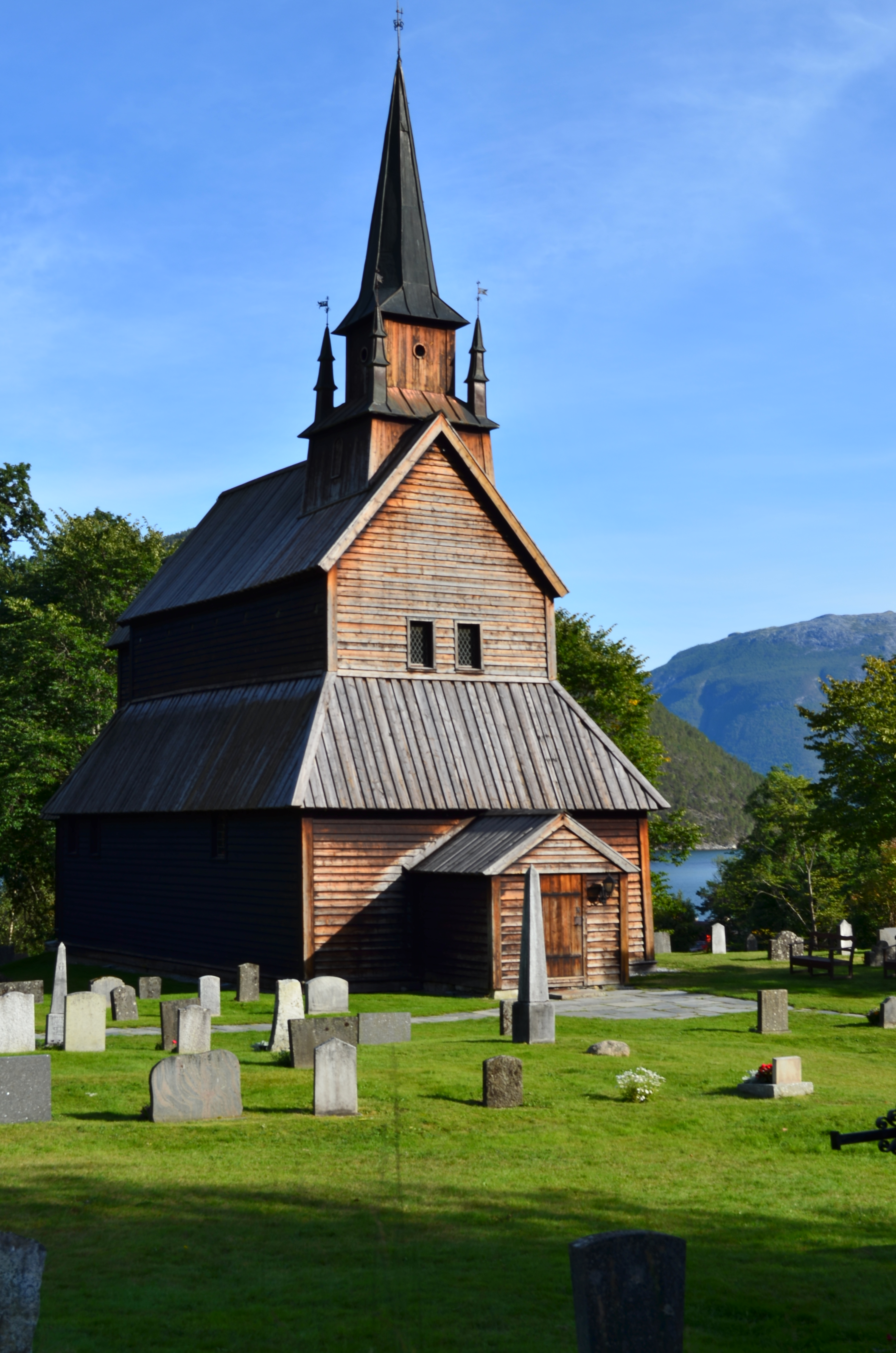 Kaupanger Stavkyrkje, Norvège